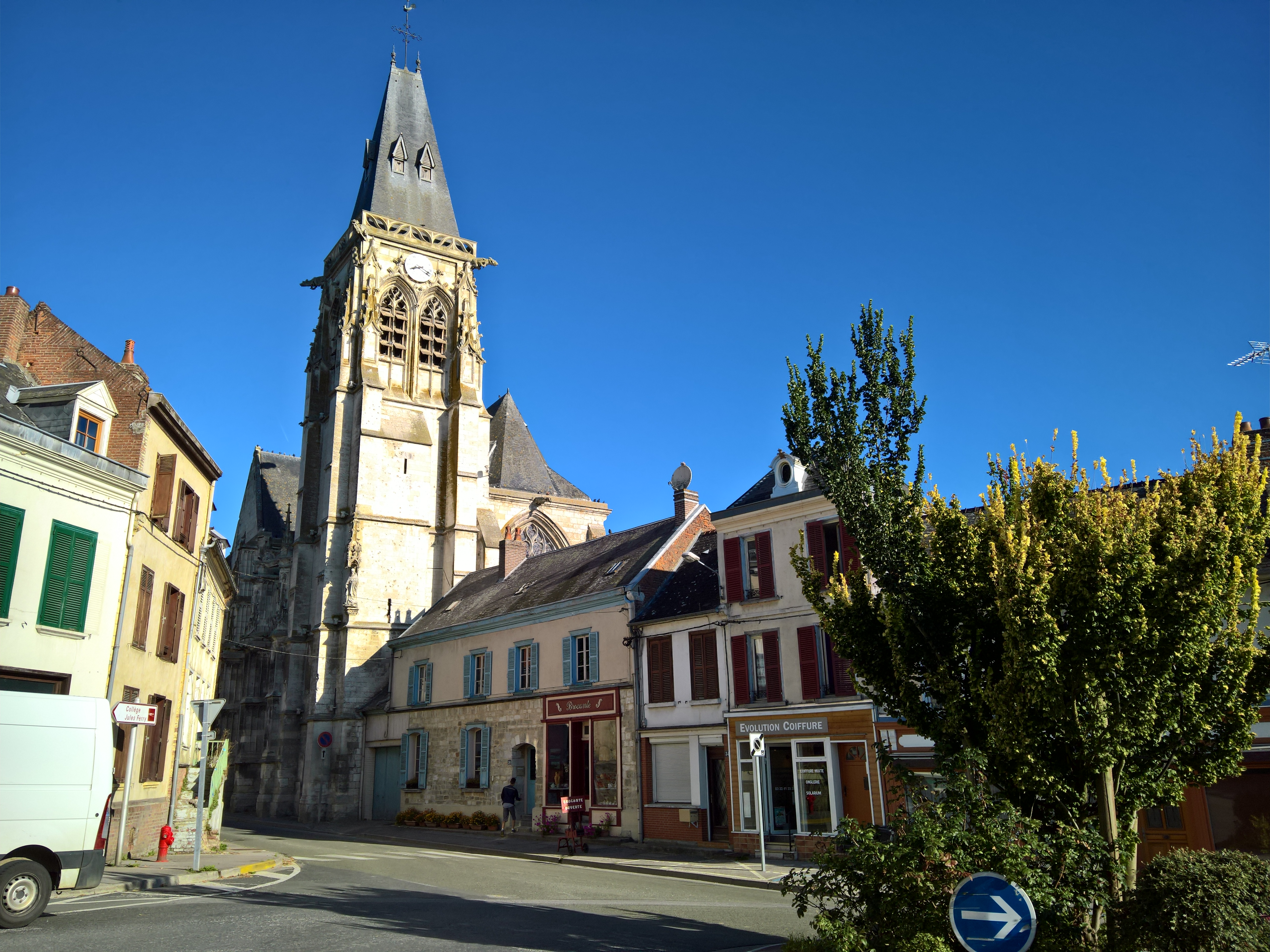 Conty - Extrémité ouest de la place du Général-de-Gaulle et clocher de l'église Saint-Antoine